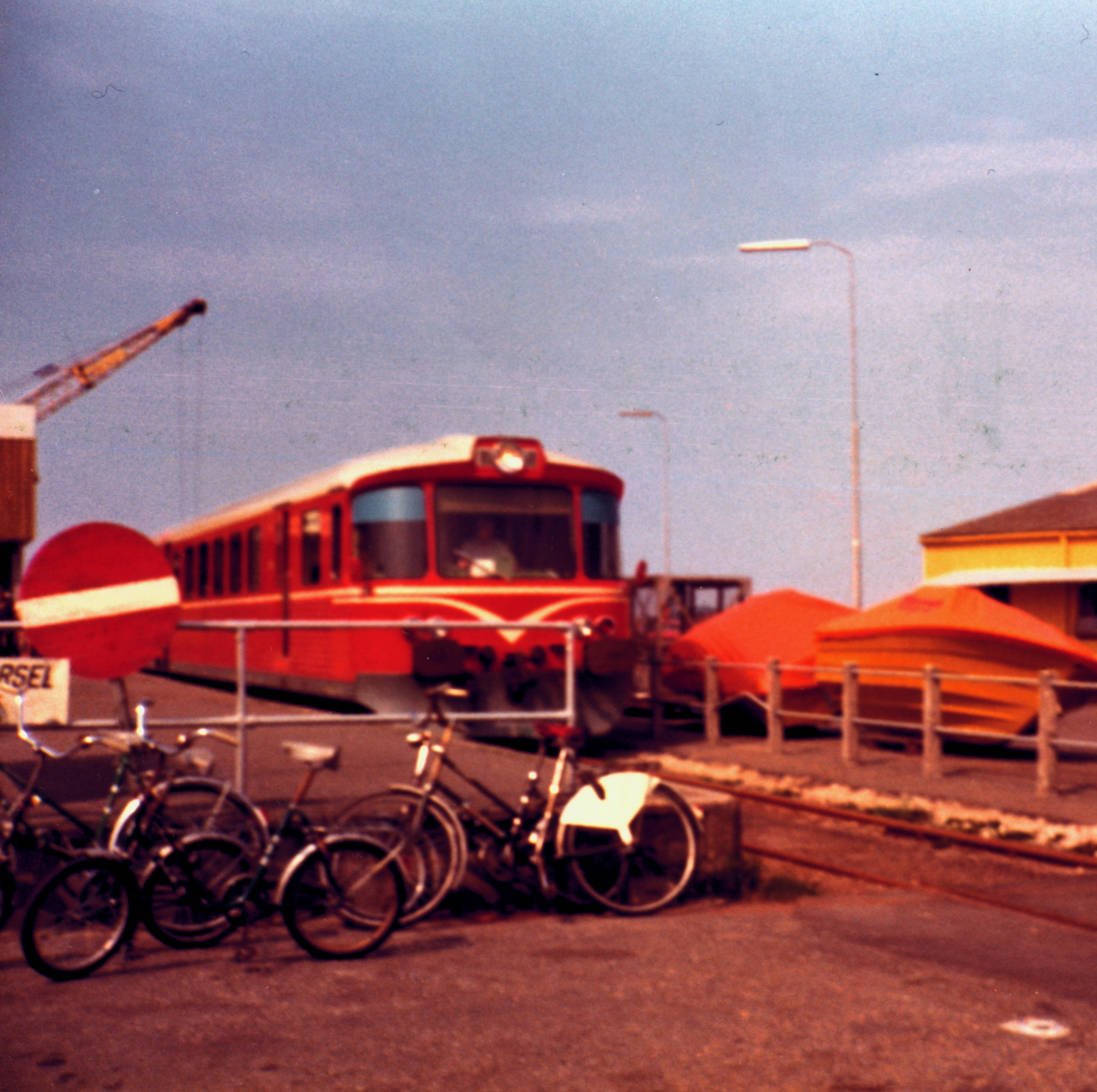 Hirtshals, rälsbussen till Hjørring, 1984